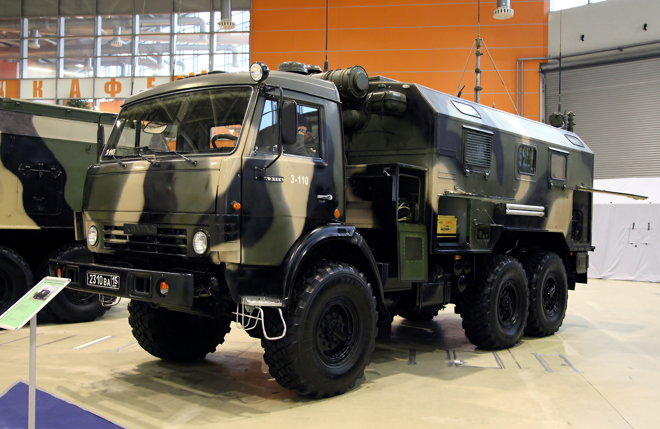 Командно-штабная машина Р-142НСА (R-142NSA command vehicle)